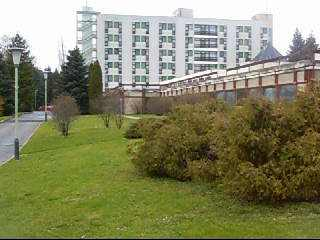 A soproni Állami Szanatórium balfi Gyógyfürdő kórháza oldalnézetben